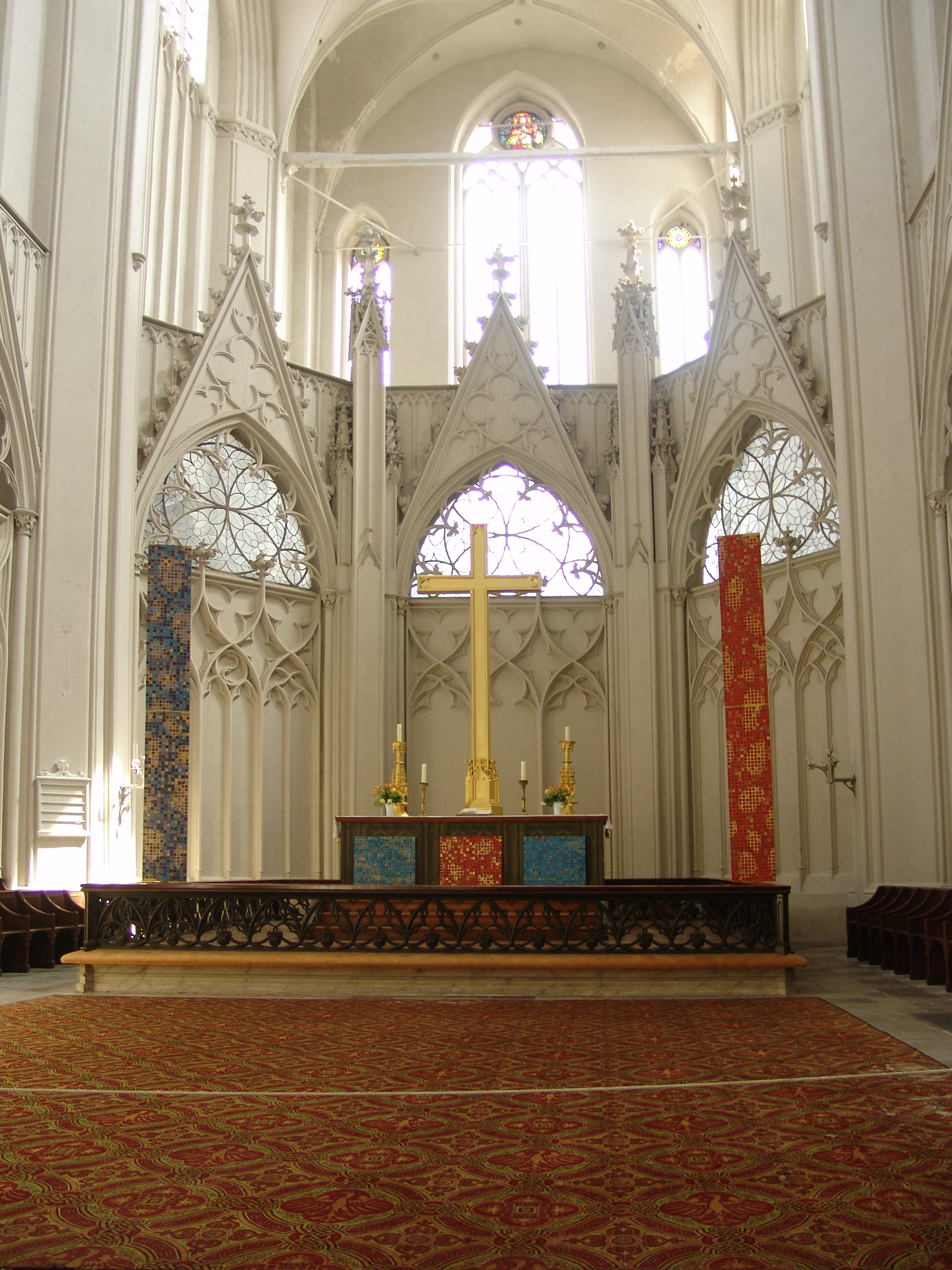 Dom St. Nikolai in Greifswald